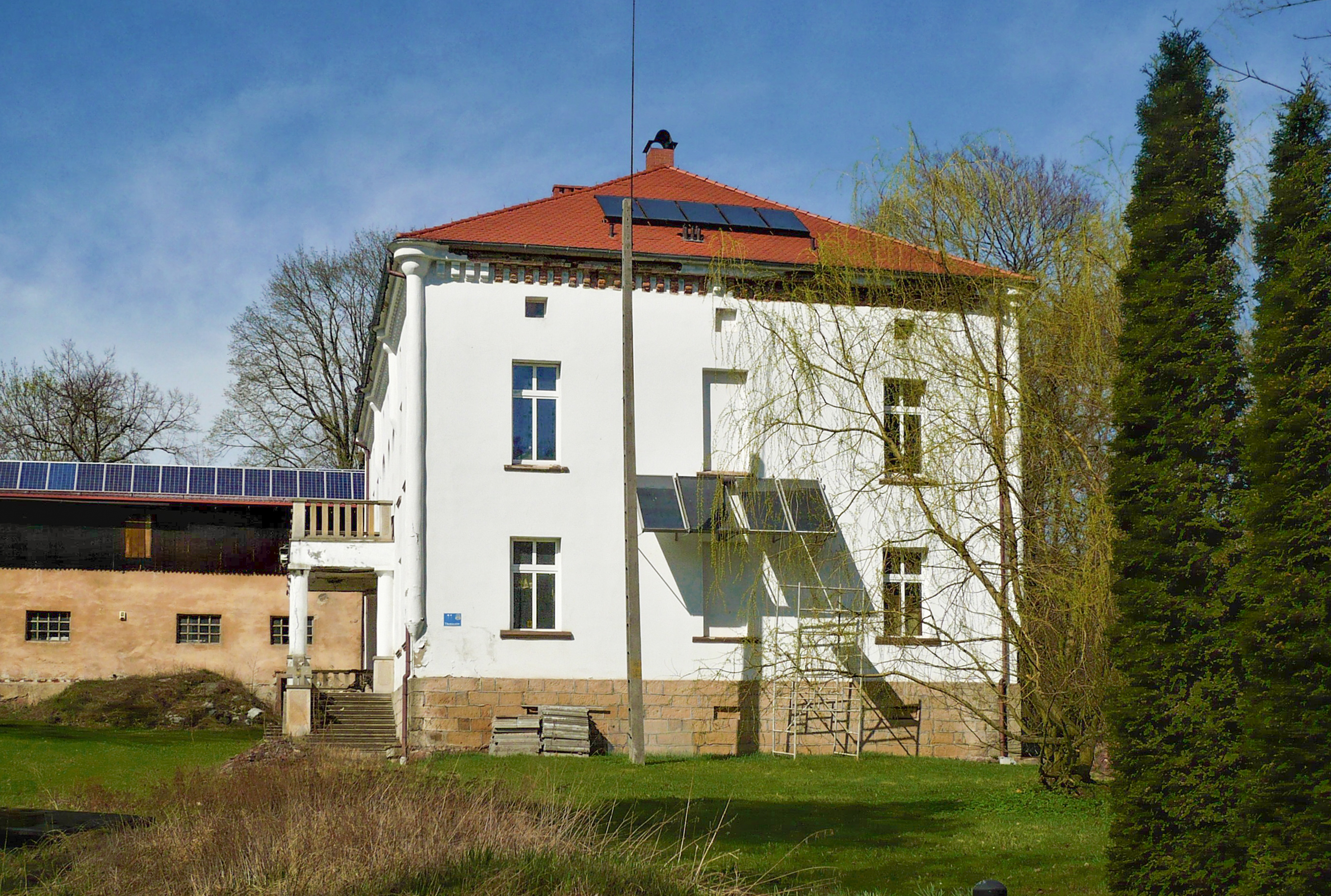 Tłumaczów. Dwór